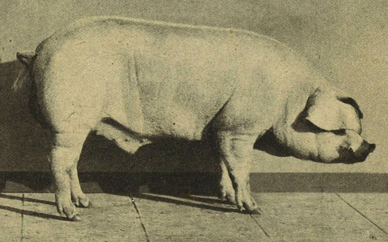 Der bemerkenswerte Eber Robust 301 (geb. 13.12.1912) wurde noch im Alter von 8 Jahren für 4.000 RM verkauft. Seine Abstammung lässt sich auf der väterlichen Seite lückenlos bis zum Eber Rabe M 10 (*1.10.1885) als Stammvater dieser Linie zurückführen.